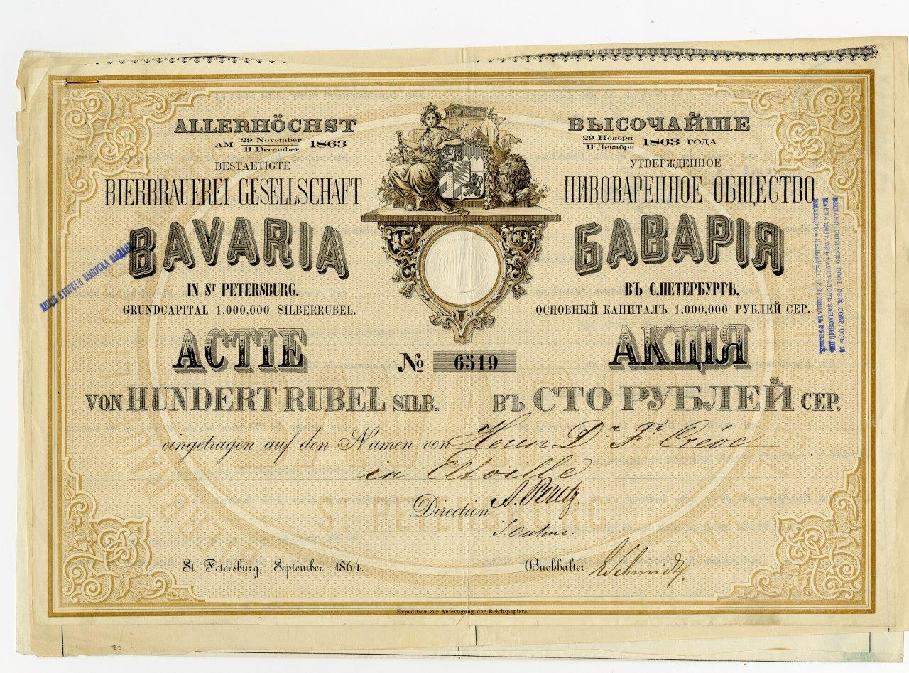 Акция в 100 руб. серебром, именная, Пивоваренного общества Бавария в С.-Петербурге. С.-Петербург, 1864 г.